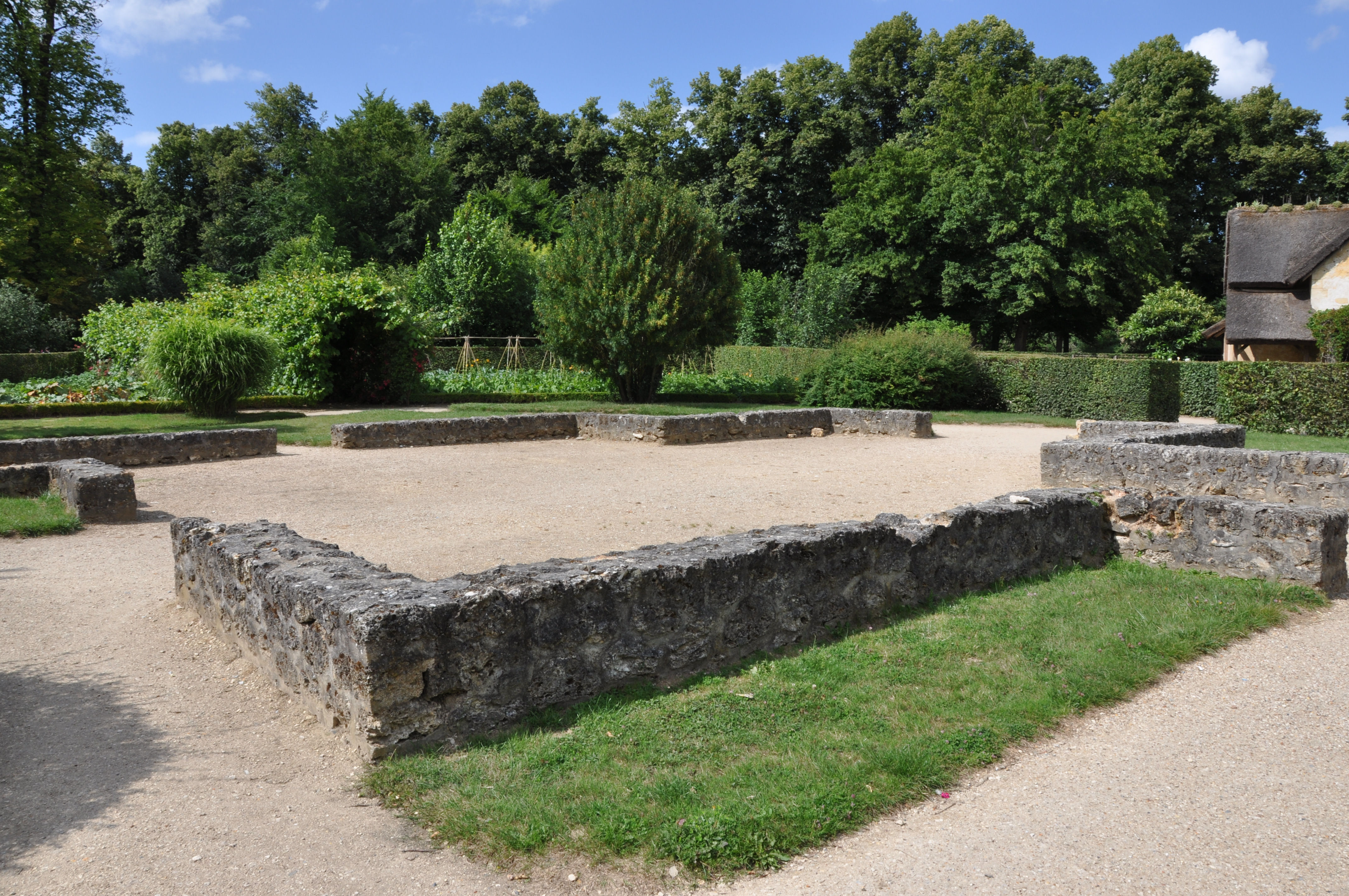 Emplacement de l'ancienne grange du hameau de la Reine